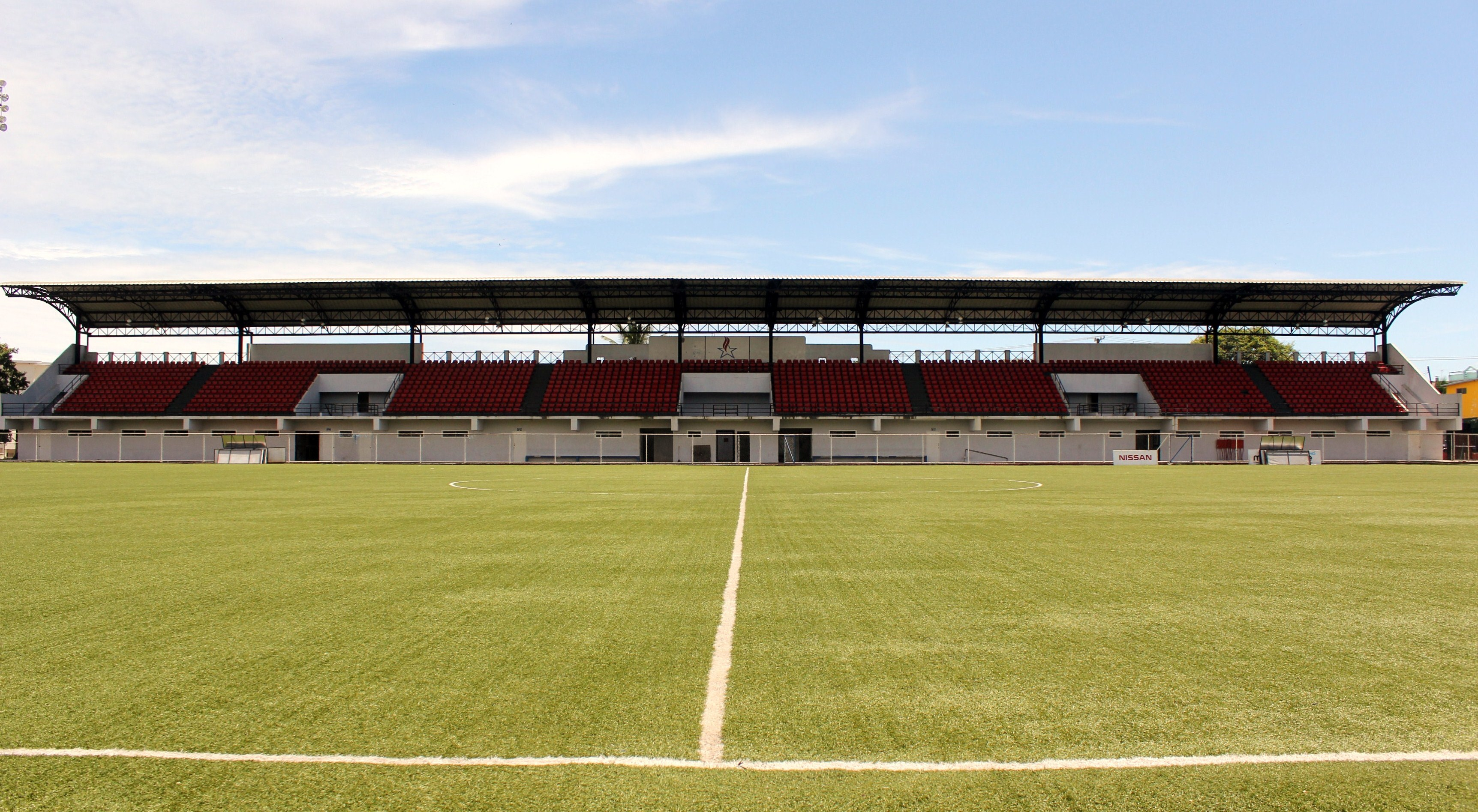 Estadio MUQUITA SANCHEZ La Chorrera, Panamá